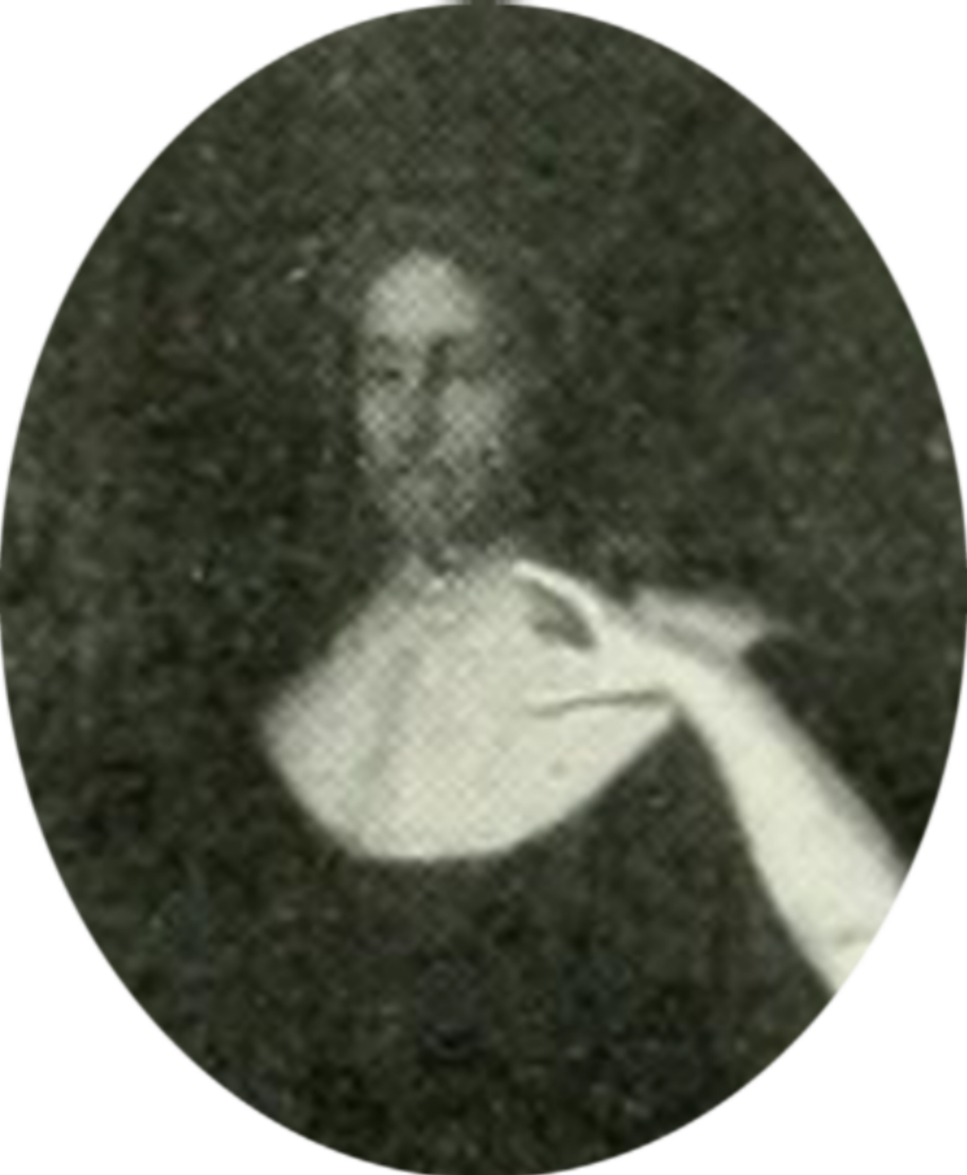 Hieronymus von Dorne (Bürgermeister) ((* 1646 in Lübeck; † 12. Oktober 1704 ebenda)), Lübecker Bürgermeister. Ausschnitt seines Epitaphs in der Lübecker Marienkirche, 1942 verbrannt.